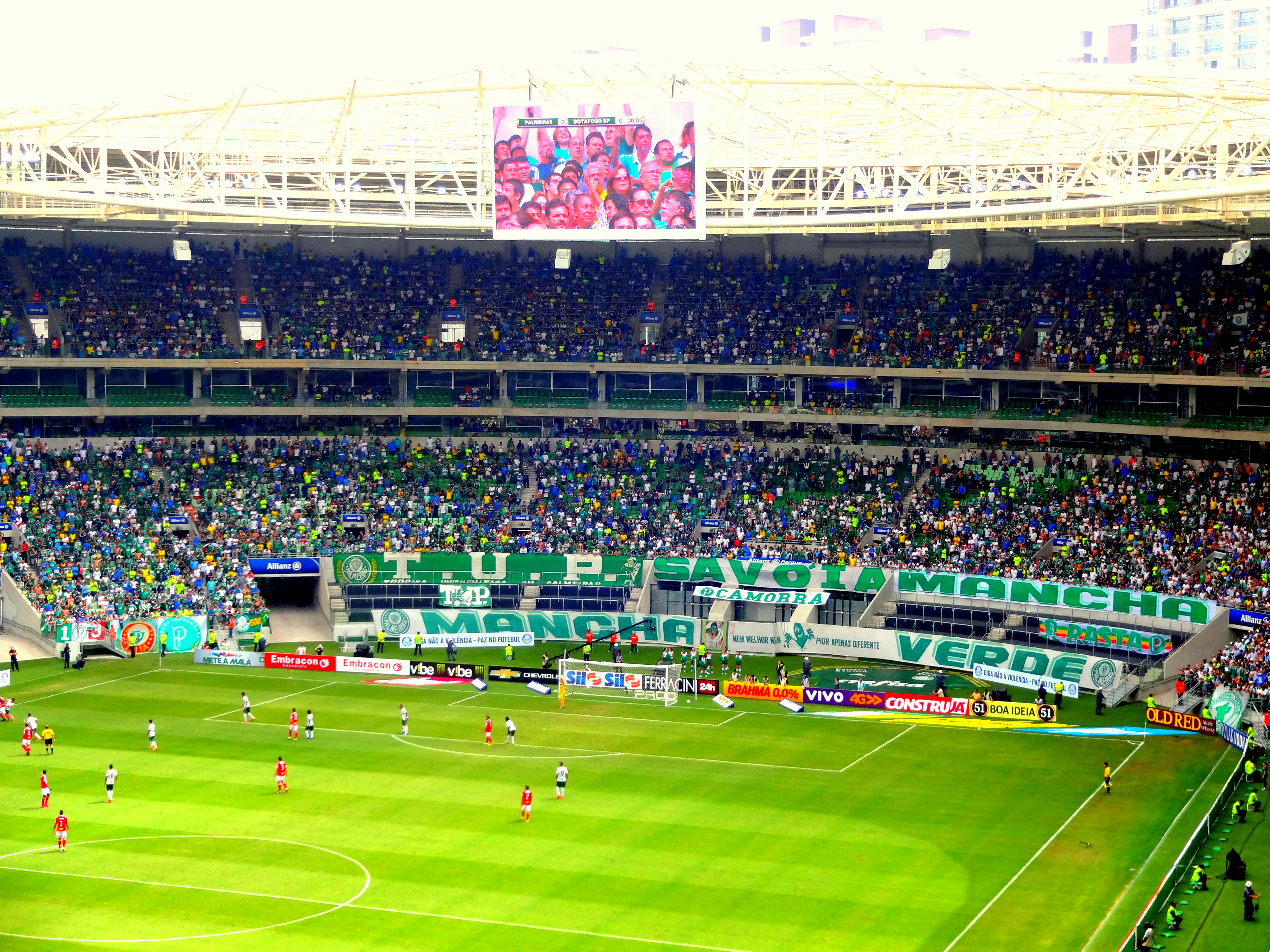 Palmeiras 1 x 0 Botafogo SP - Paulistão Itaipava 2015